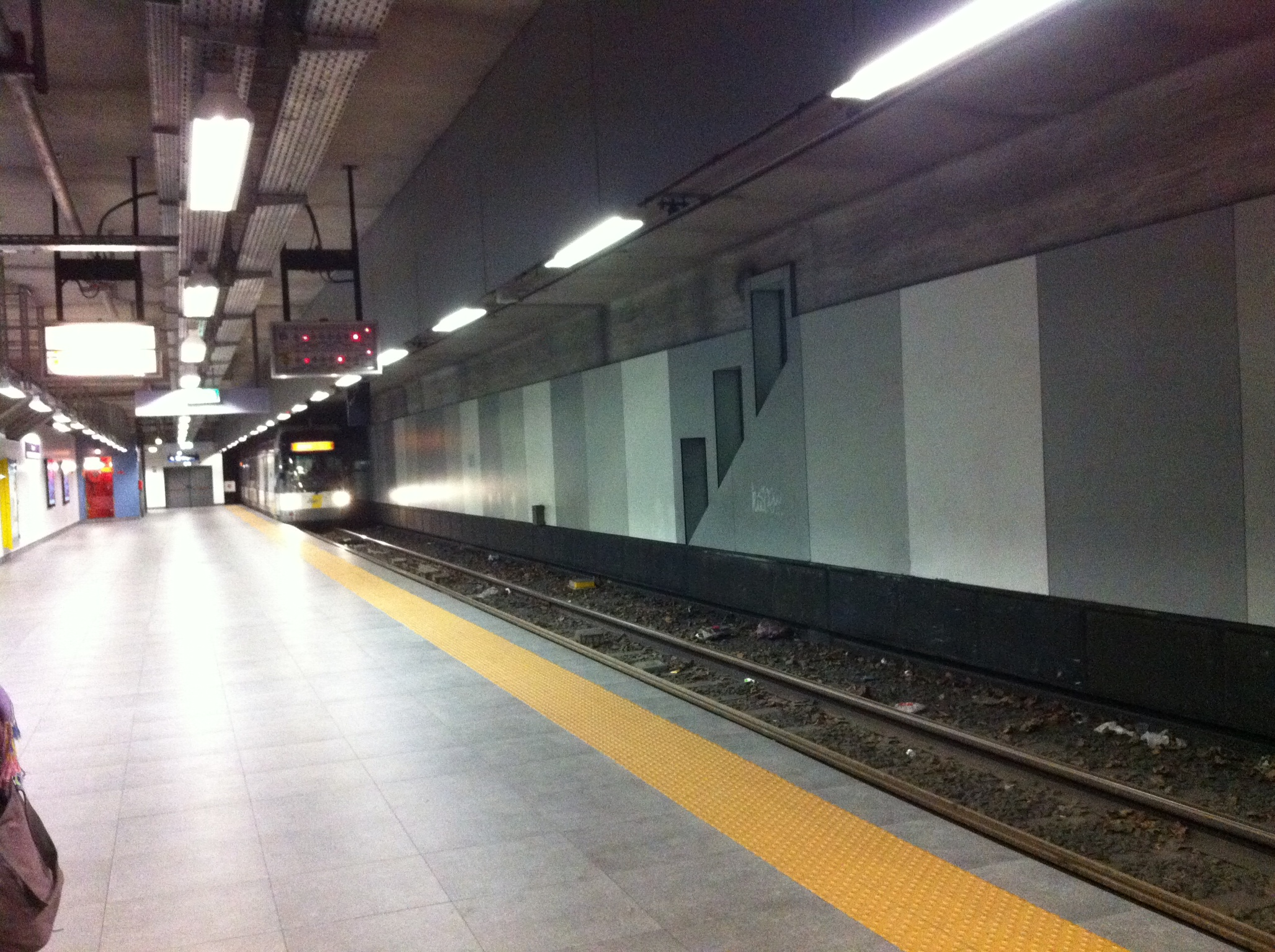 Metro Diamant - Tram